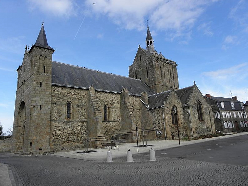 Église Notre-Dame de Pontorson (50).